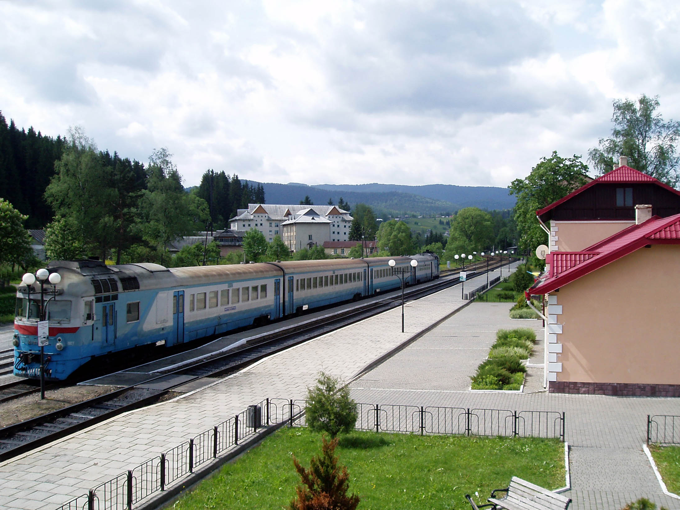 Дизель-поїзд Д1 757-1. На залізничній станції у Ворохті.